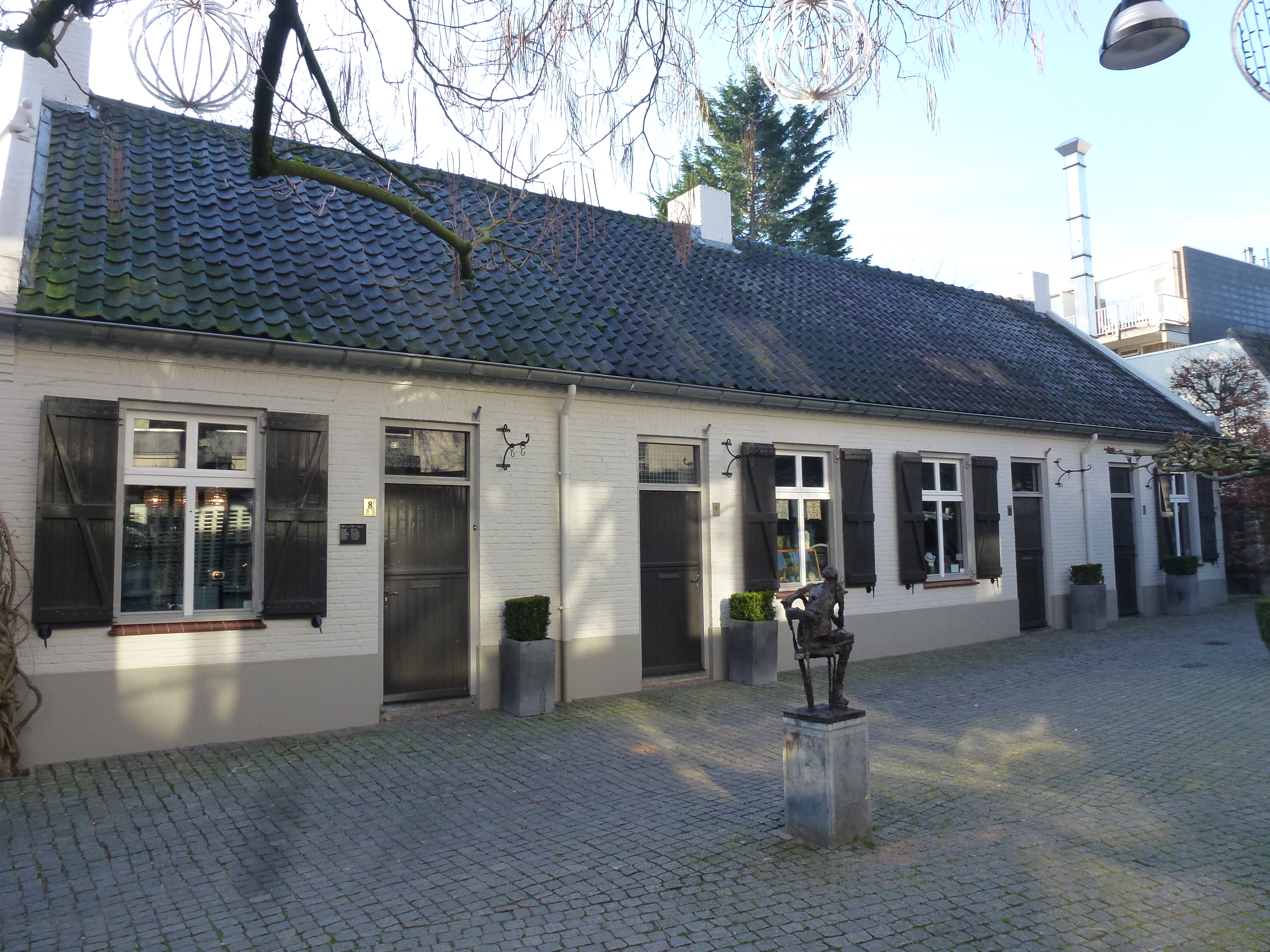 Ketsegangske 2-8, Helmond